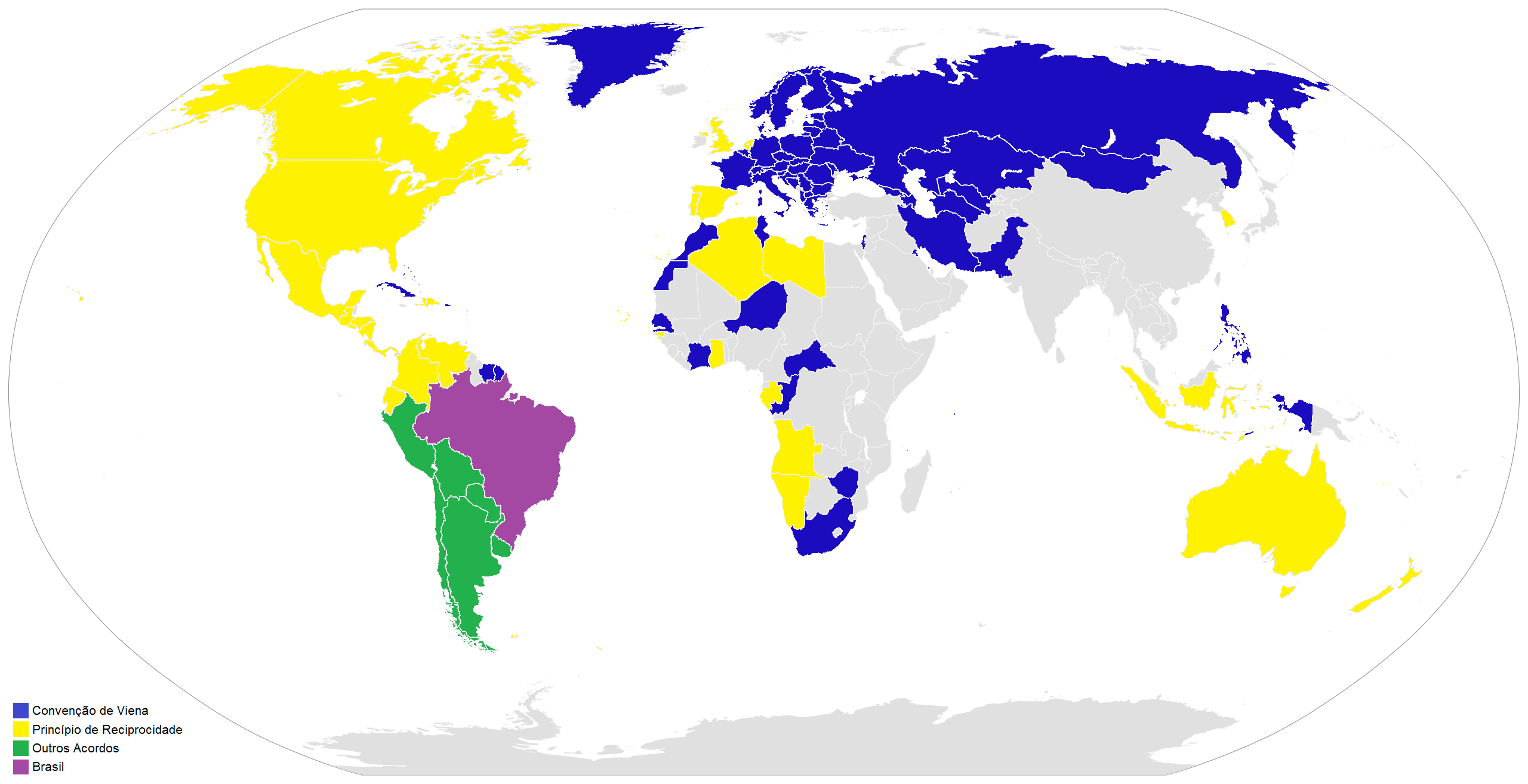 Locais onde a PID do Brasil é aceita.